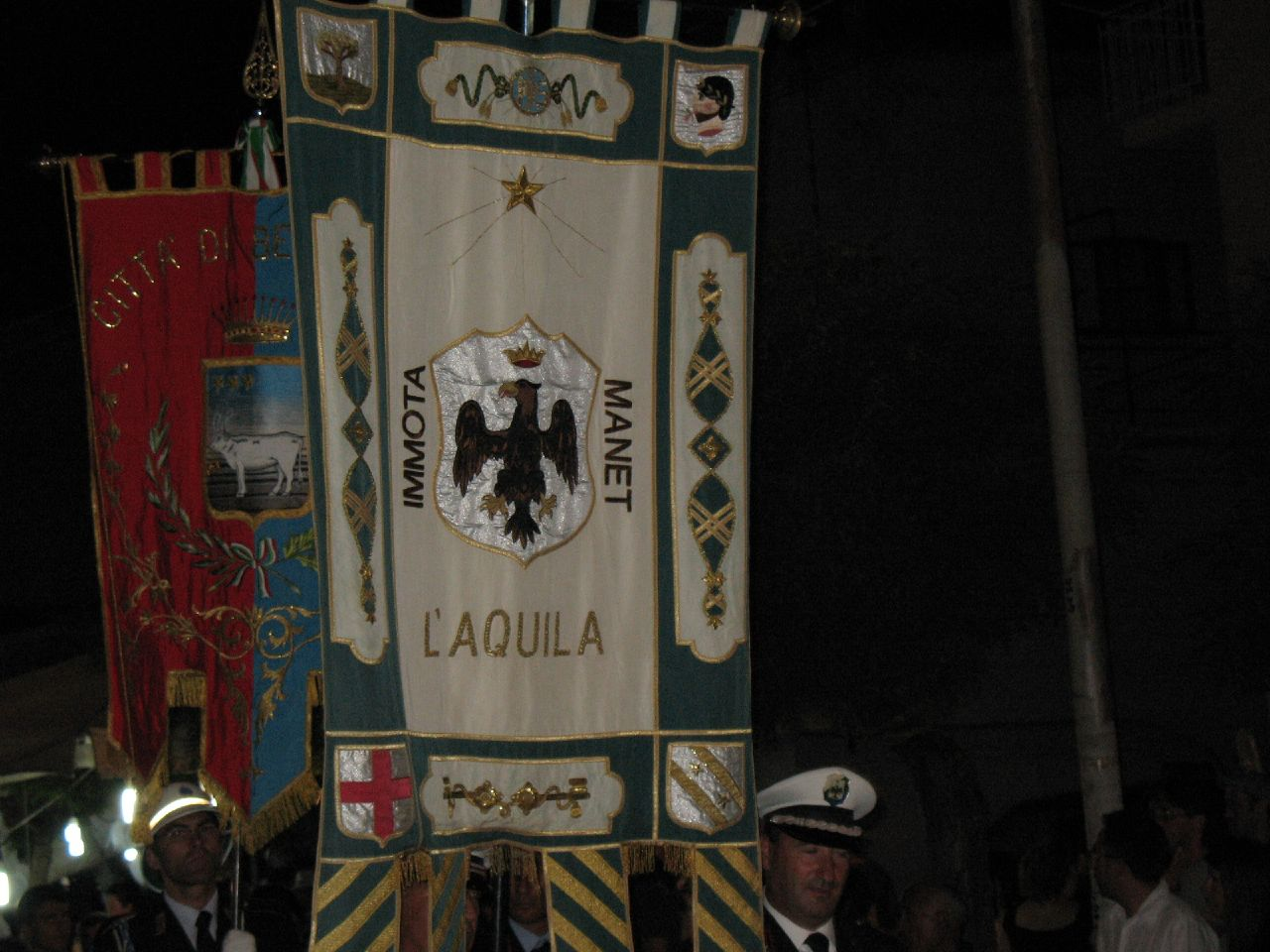 Gonfalone dell'Aquila durante la festa di San Bernardino a Bernarda